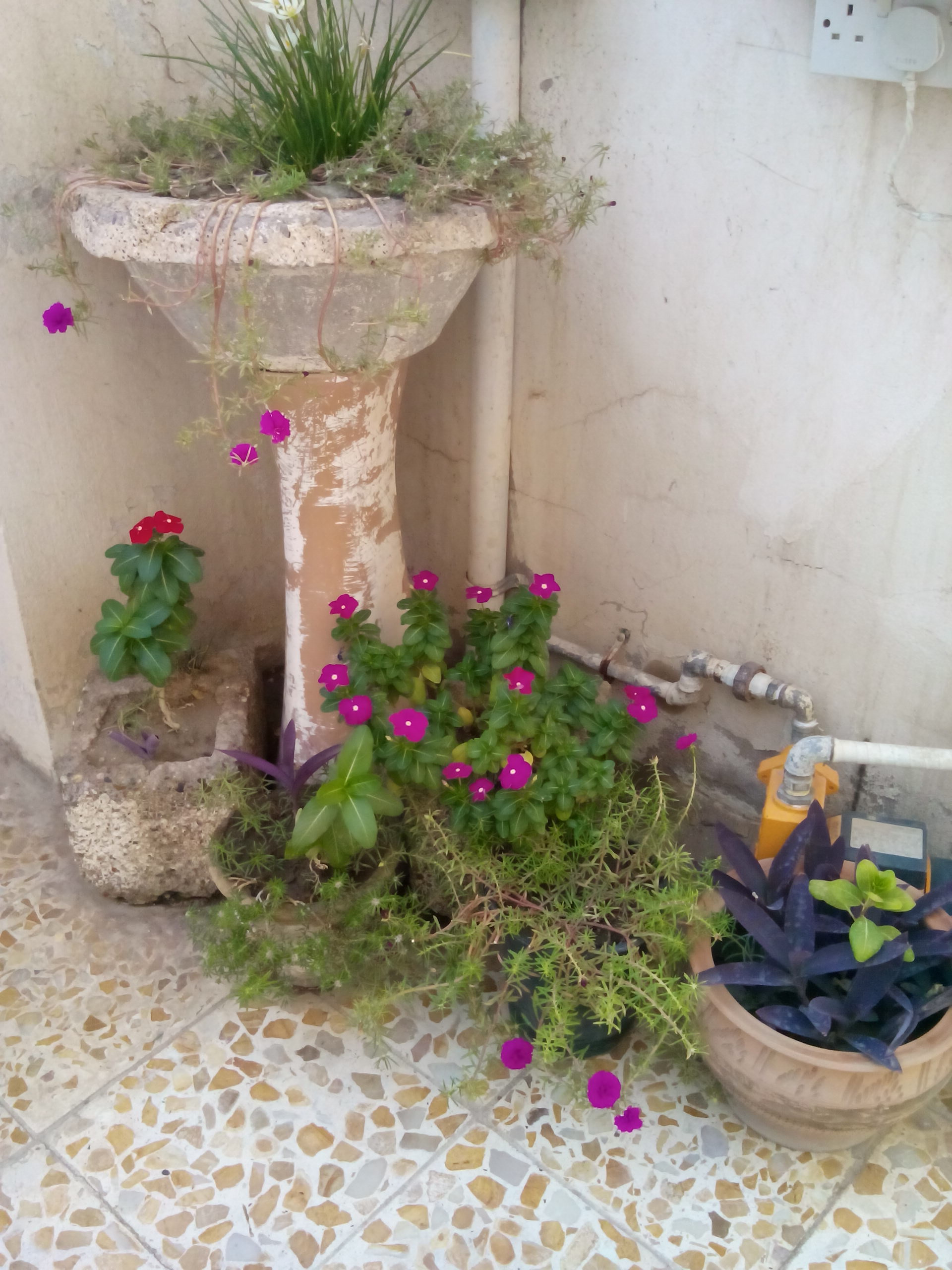 أصيص أزهار في حديقة منزلية